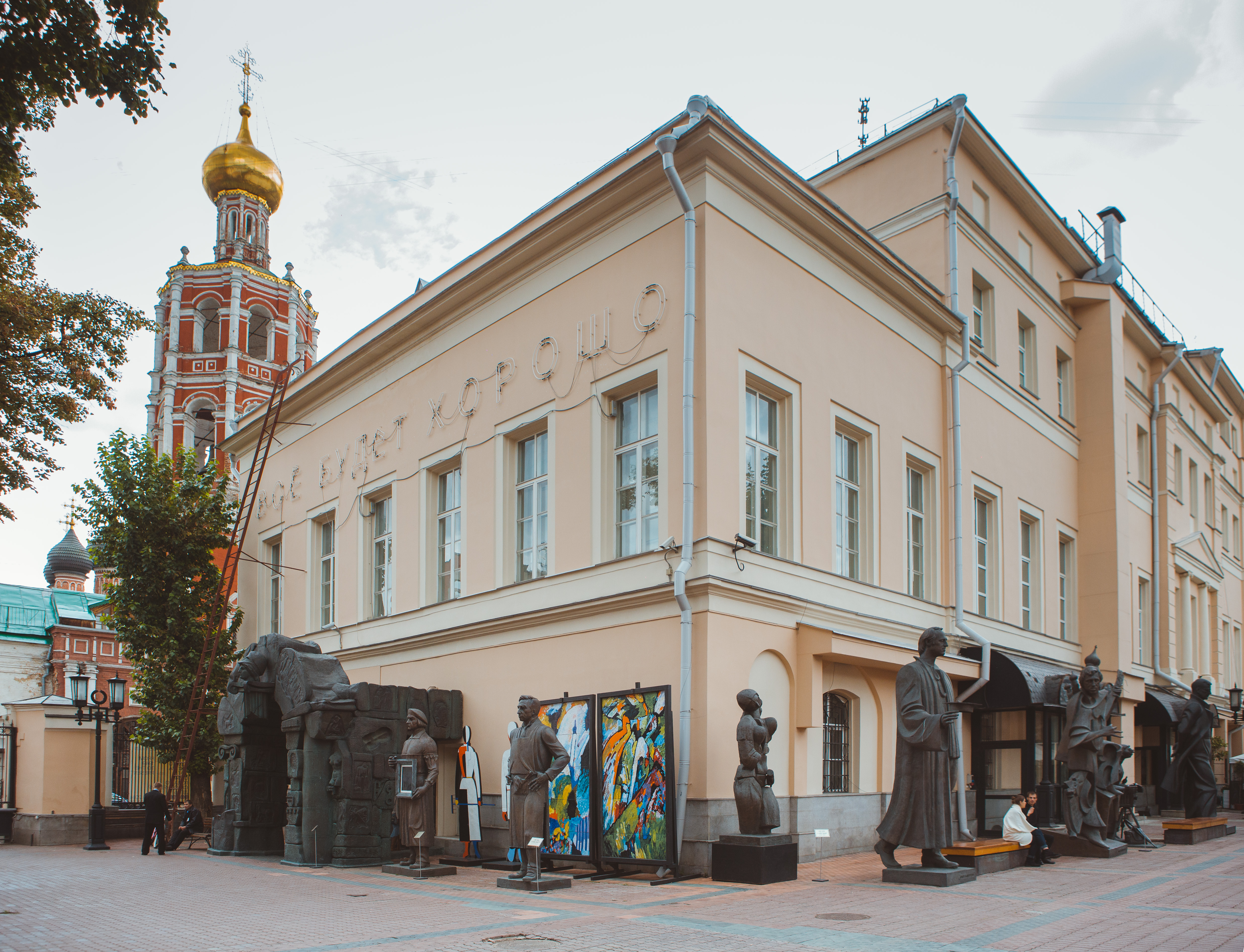 Здание ММОМА на ул. Петровка, 25